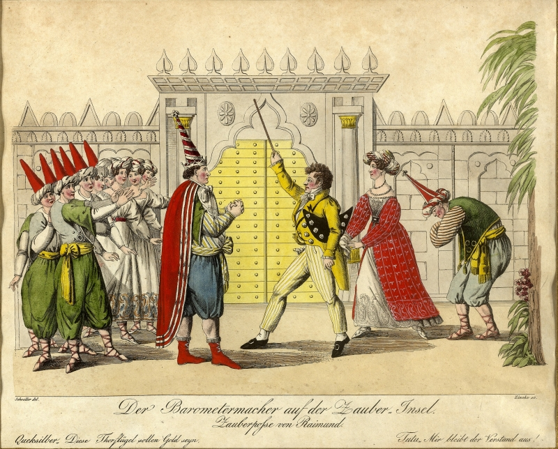 Bartholomäus Quecksilber demonstriert vor dem Inselherrscher Tutu die Macht seines Zauberstabes: „Diese Thorflügel sollen Gold seyn.“ Das Szenenbild zeigt Josef Friedrich Korntheuer als Tutu, Ferdinand Raimund als Bartholomäus Quecksilber und Therese Krones als Zoraide.